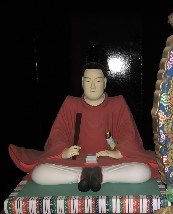 丹後宮津藩主・永井尚長の木像。京都府宇治市宇治山田の興聖寺所蔵。